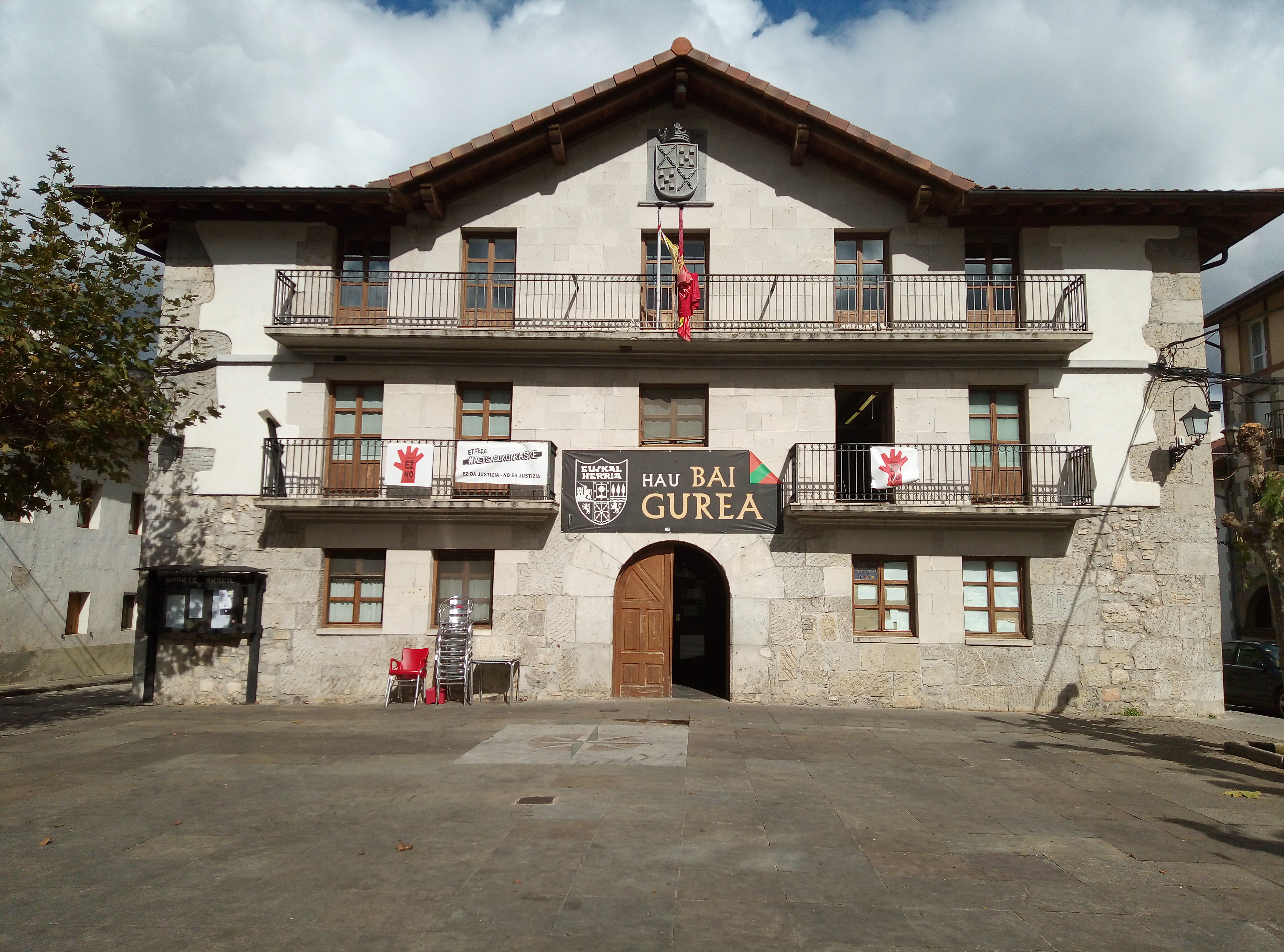 Udaletxea eta jubilatuen elkartea